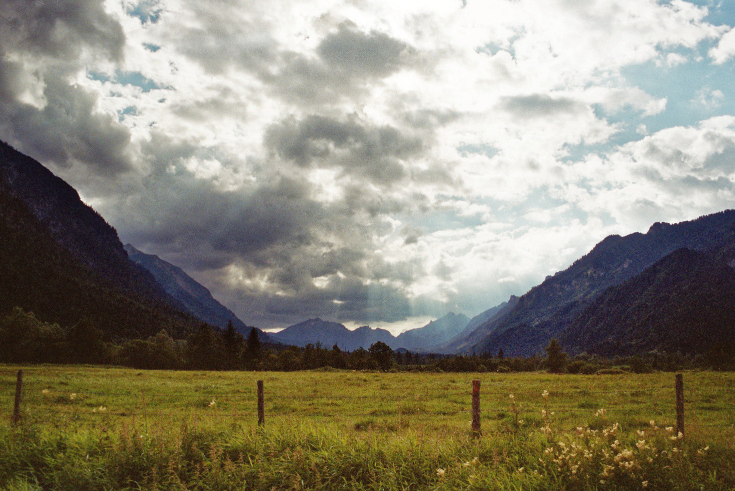 Das Graswangtal, von Ettal aus gesehen